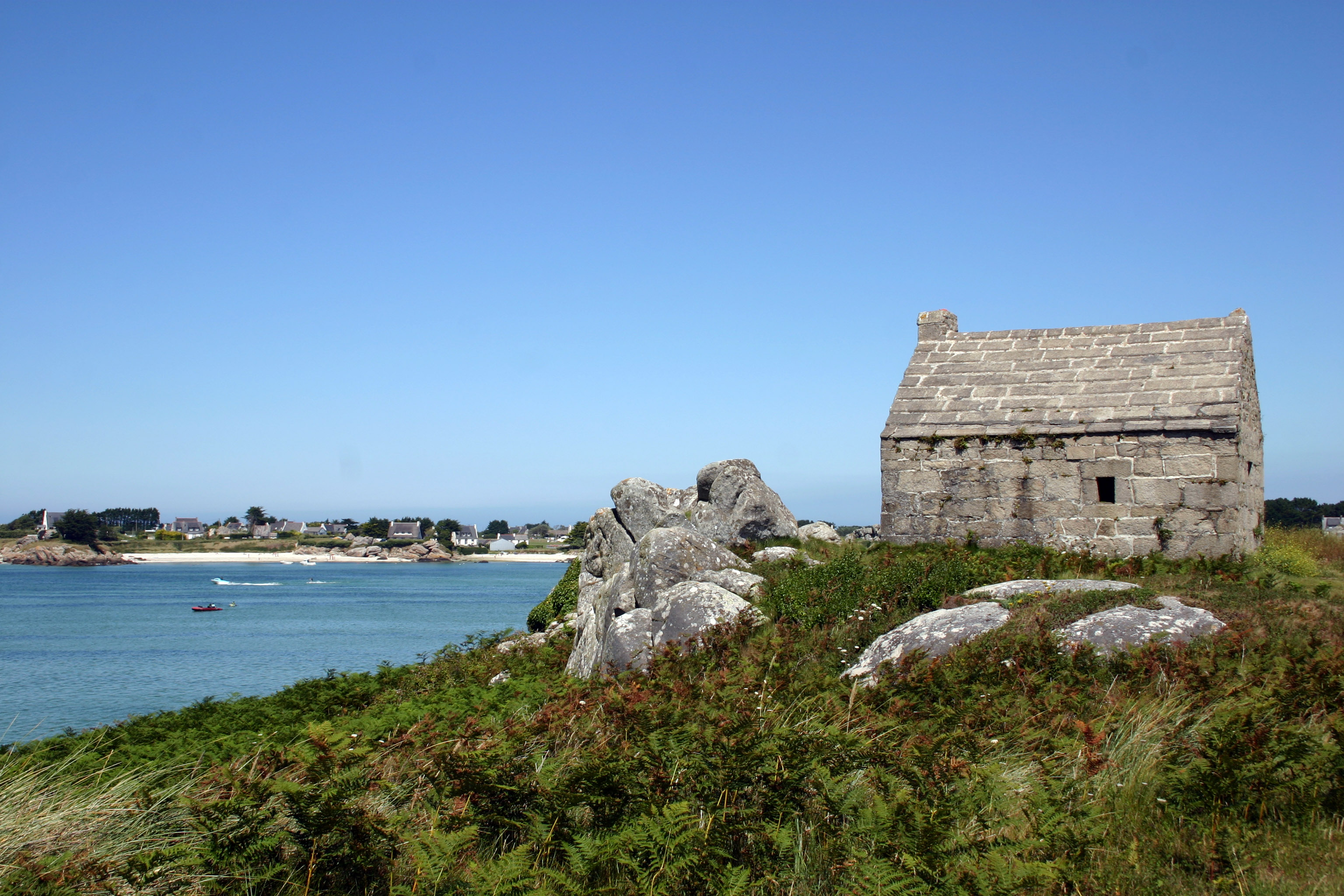 Maison du garde sur le sentier des douaniers à Guissény Finistère Bretagne France